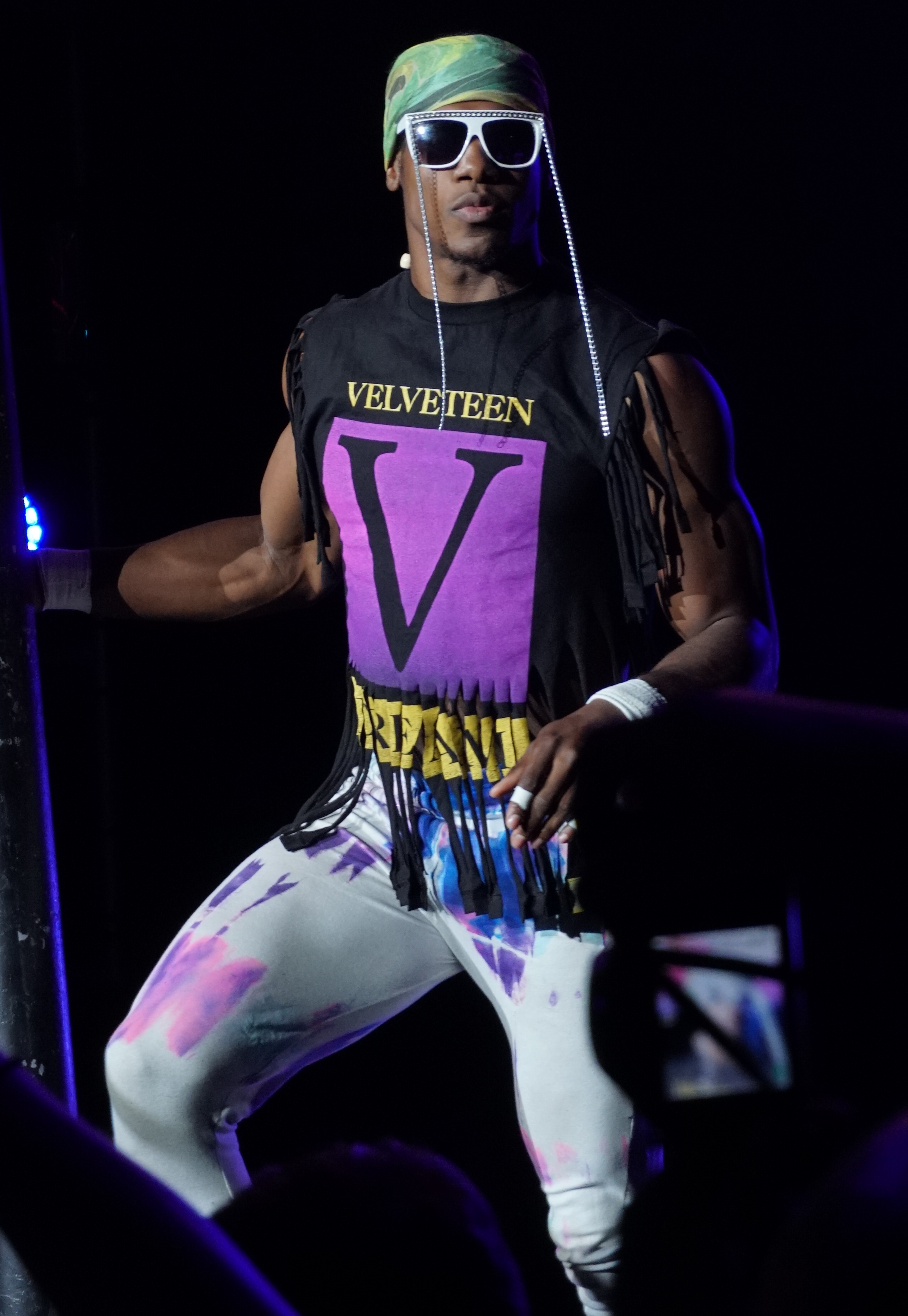 WWE Live 2018 - Antwerpen (NxT) - Aleister Black & Johnny Gargano & Pete Dunne Vs Lars Sullivan & The Velveteen Dream & Tommaso Ciampa Aleister Black & Johnny Gargano & Pete Dunne def. (Pin) Lars Sullivan & The Velveteen Dream & Tommaso Ciampa Type of match : 6-person tag ( Bonne nouvelle pour les inconditionnels du catch en Belgique : le mardi 12 juin 2018, les superstars de NXT donneront le meilleur d'eux-memes au Stadsschouwburg Antwerpen, lors d'un show exclusif au Benelux. WWE NXT est une emission televisee creee en 2010, durant laquelle de jeunes catcheurs sont formes par des veterans comme Chris Jericho et C.M. Punk. Tous partagent le meme reve : devenir la nouvelle star du catch. Le programme WWE NXT a tres vite rencontre un enorme succes. Aujourd'hui, WWE NXT est connu comme une veritable machine a talents. Pensez par exemple a Seth Rollins, qui etait encore chez nous pas plus tard que l'annee derniere pour WWE Live. Cette annee encore, vous aurez la chance de voir a l'oeuvre de nombreux nouveaux talents du catch ! A l'affiche, on trouve notamment Aleister Black, Adam Cole, Undisputed Era, Velveteen Dream, Ricochet, Nikki Cross, Shayna Baszler et Kairi Sane. Le line-up reste sujet a des changements de derniere minute. Attendez-vous a un show sensationnel et plein de tension ! )